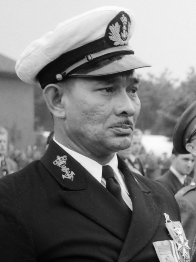 Uitreiking Militaire Willemsorde. De ridder MWO die hier de Ridderslag krijgt is A.G. Koops Dekker. De persoon geheel links [gespiegeld rechts] is Ch.L.J.F. Douw van der Krap. 31 juli 1950